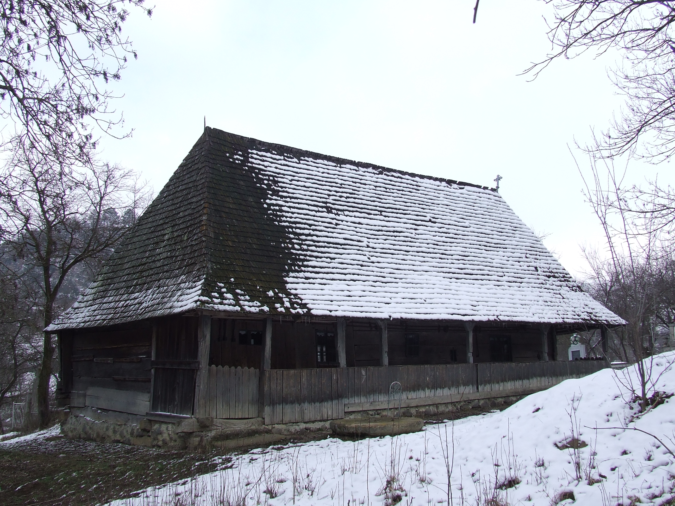 Biserica de lemn din Petea, judeţul Mureş.